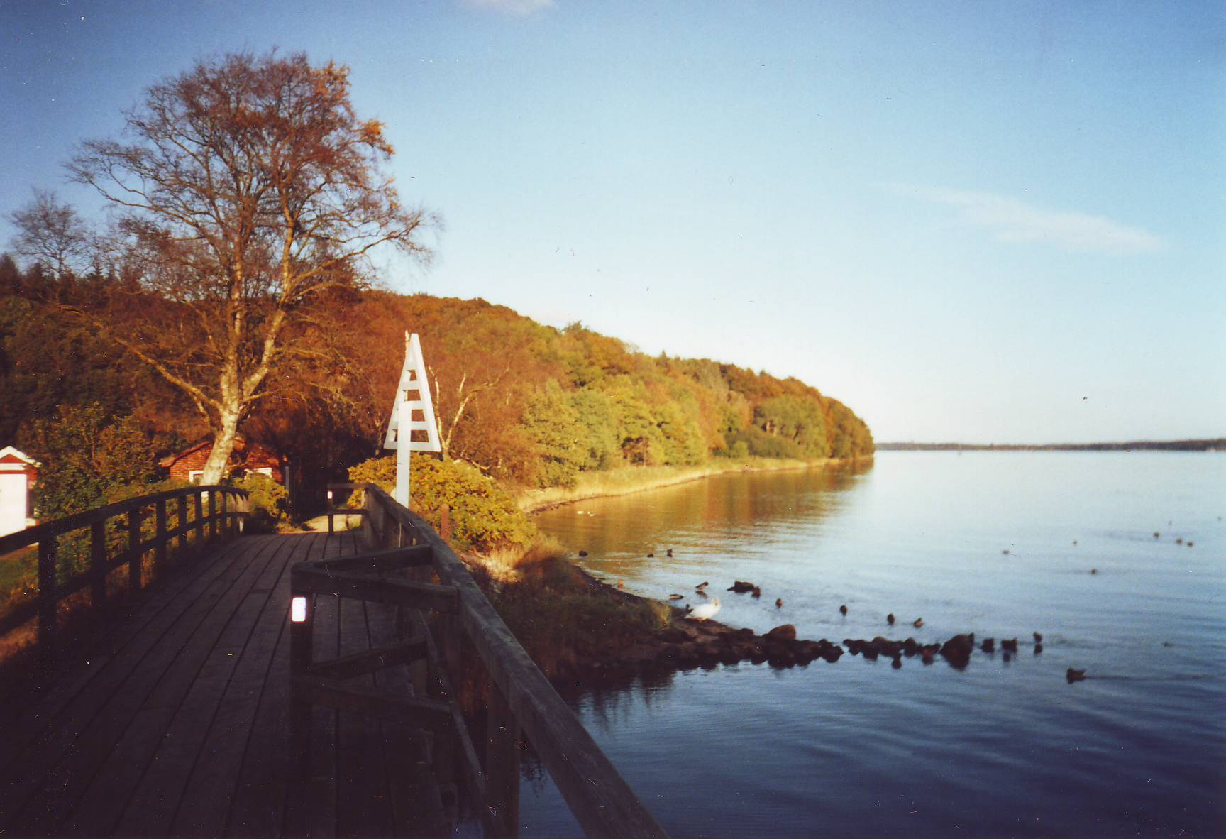 Grenzübergang Schusterkate der in den Kollunder Wald führt / Grænseovergangen ved Skomagerhus